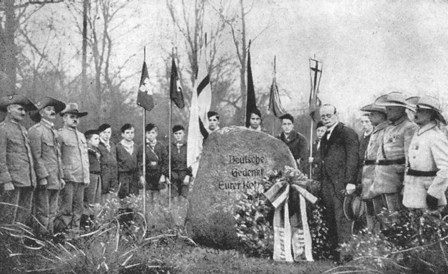 Gedenken am Kolonialstein in Leipzig durch ehemalige Soldaten nach einer Kolonialkriegertagung 1933